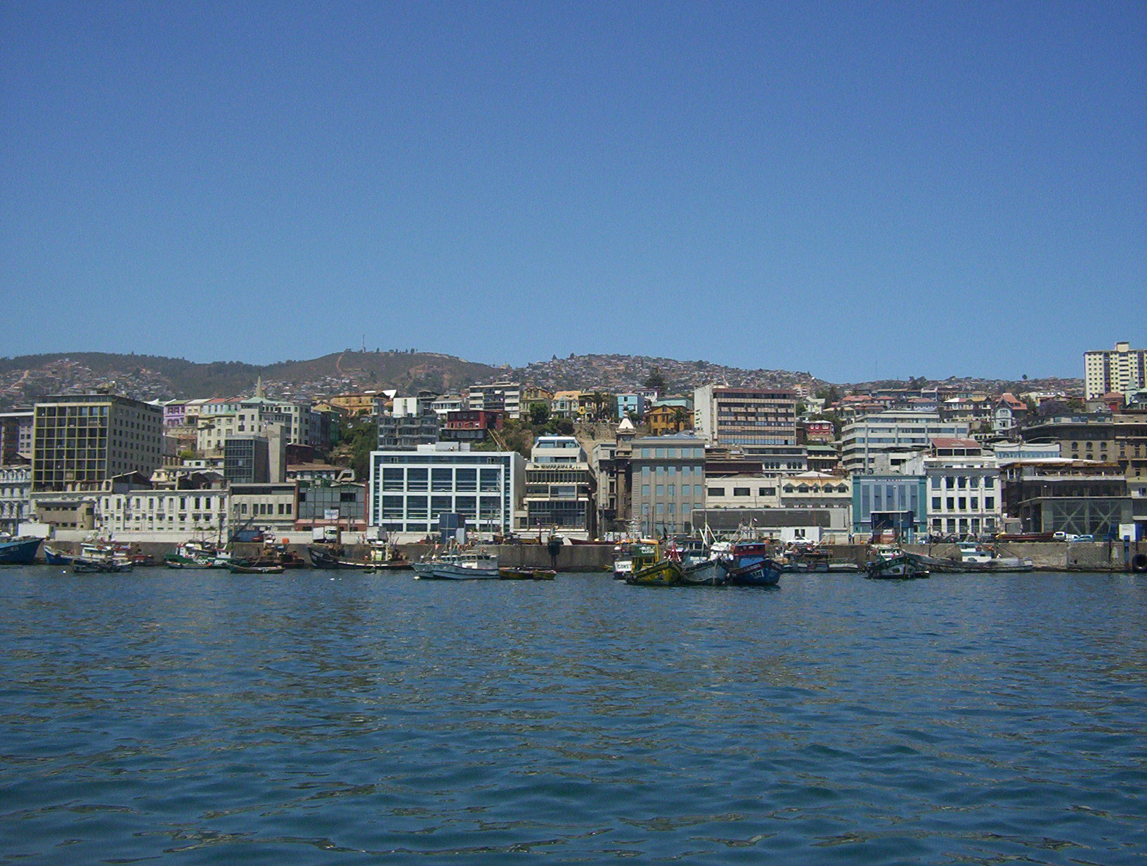 Vista desde el mar de la ciudad de Valparaíso